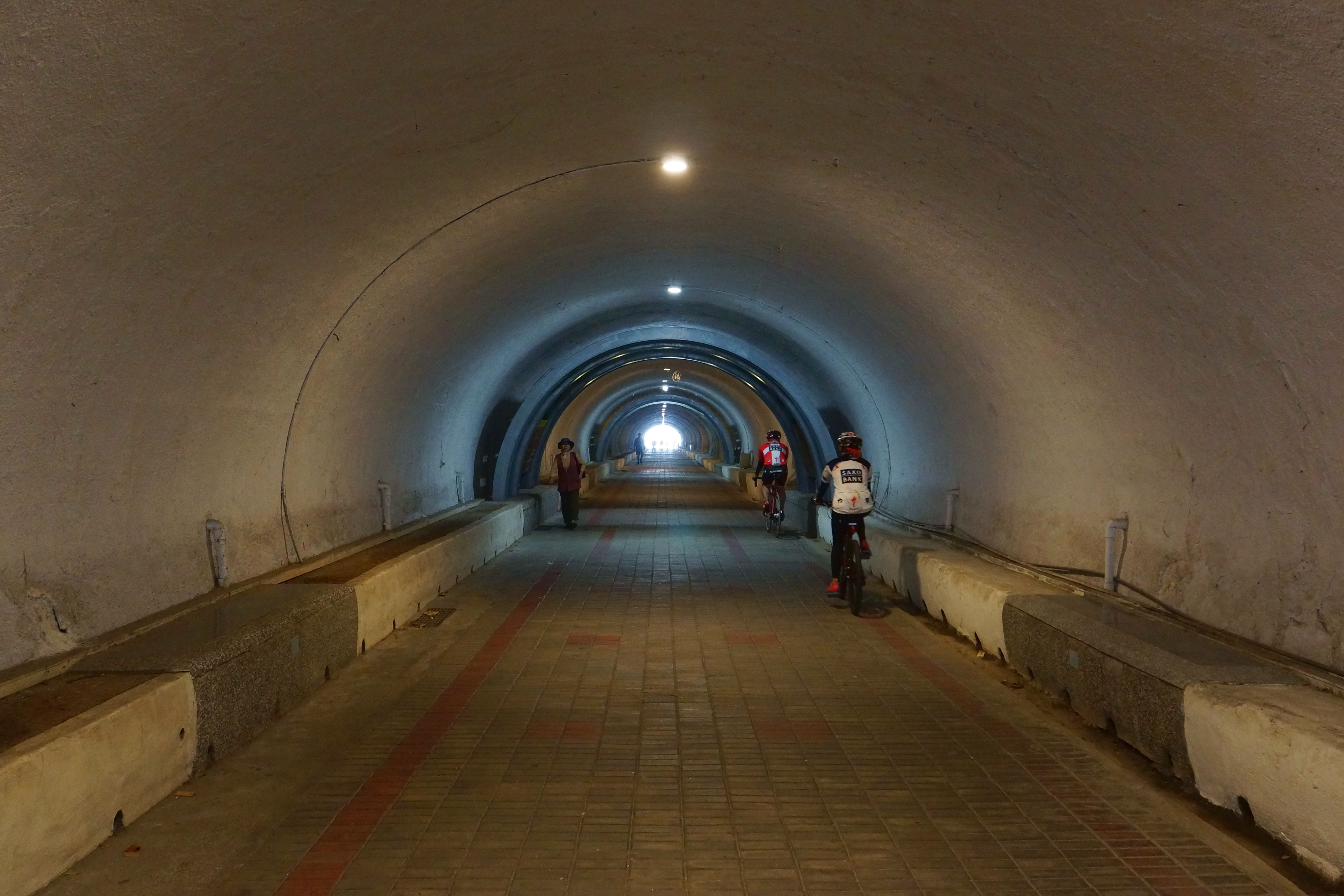 西子灣隧道 Xiziwan Tunnel